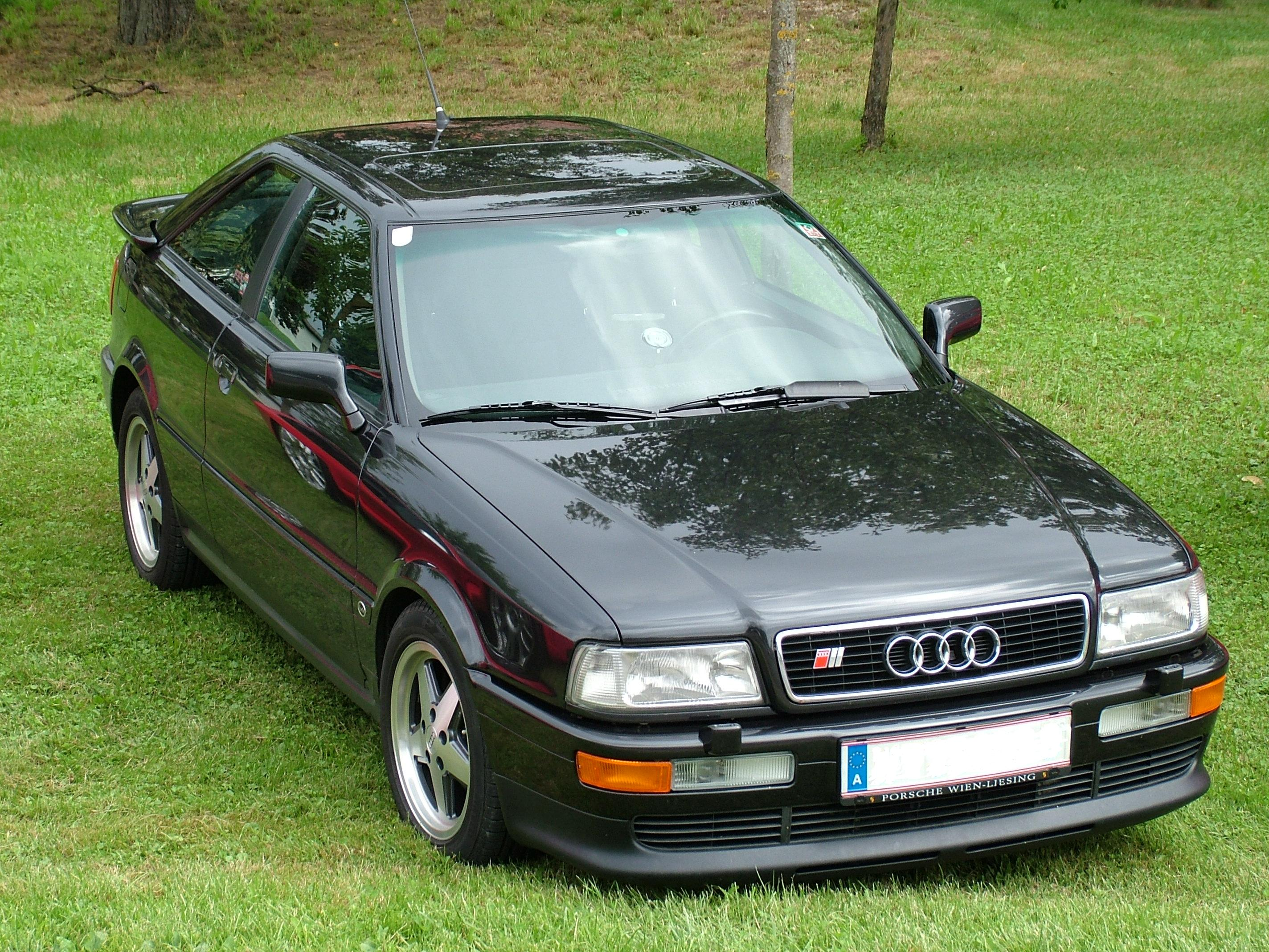 Audi S2 Coupe, Baujahr 02/1992, 5-Gang, 162kw, mit original 5-Stern Felgen